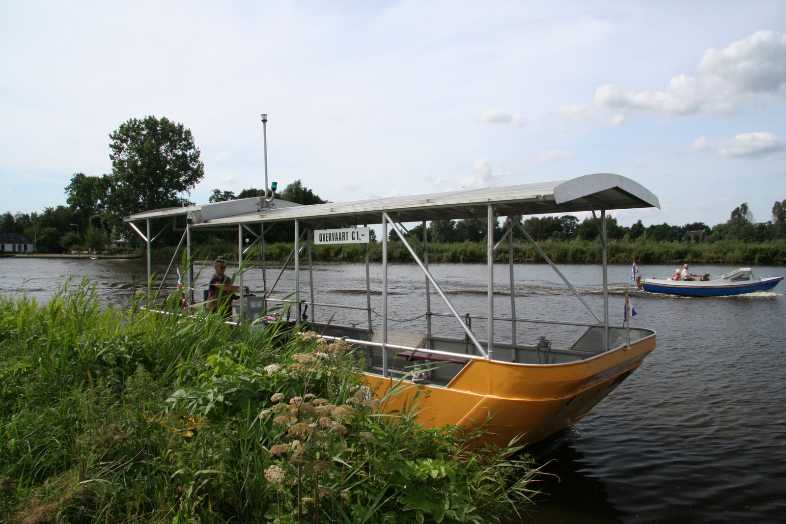 Maar weer even met het pontje naar de overkant naar Suawoude.